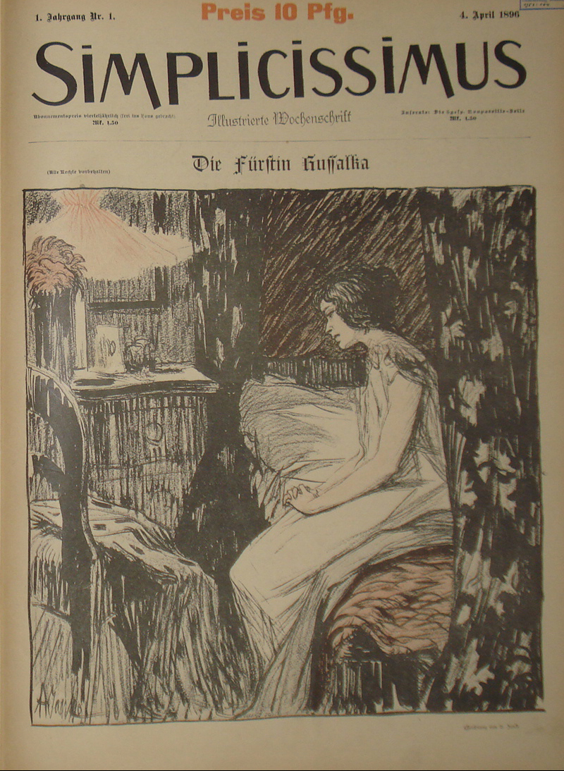 Titelblatt des ersten Heftes des ersten Jahrgangs der Zeitschrift Simplicissimus